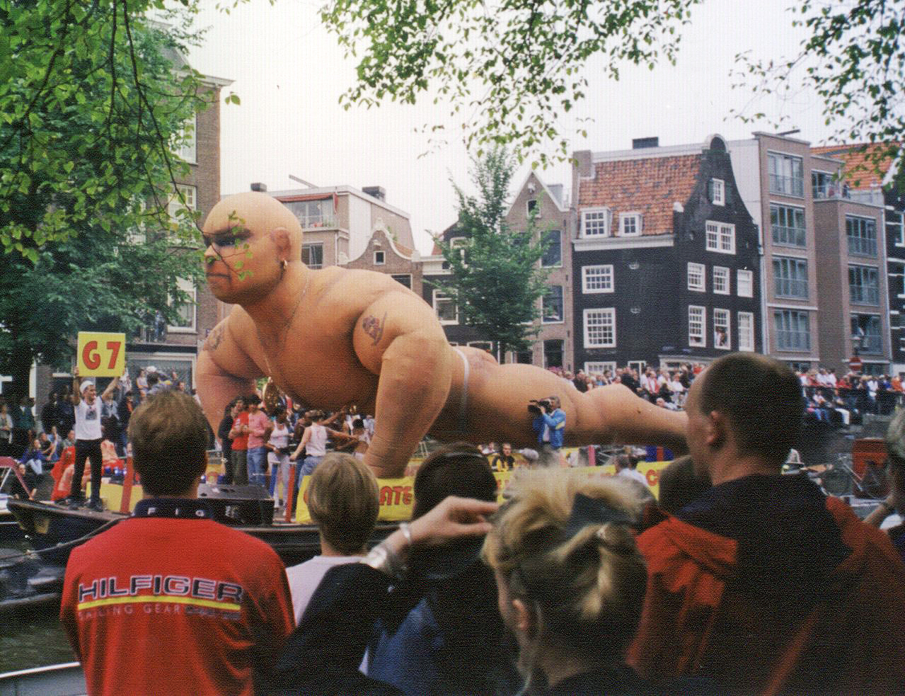 מצעד הסירות" בתעלות של אמסטרדם, לפני טקס הפתיחה של המשחקים הגאים, 1998"